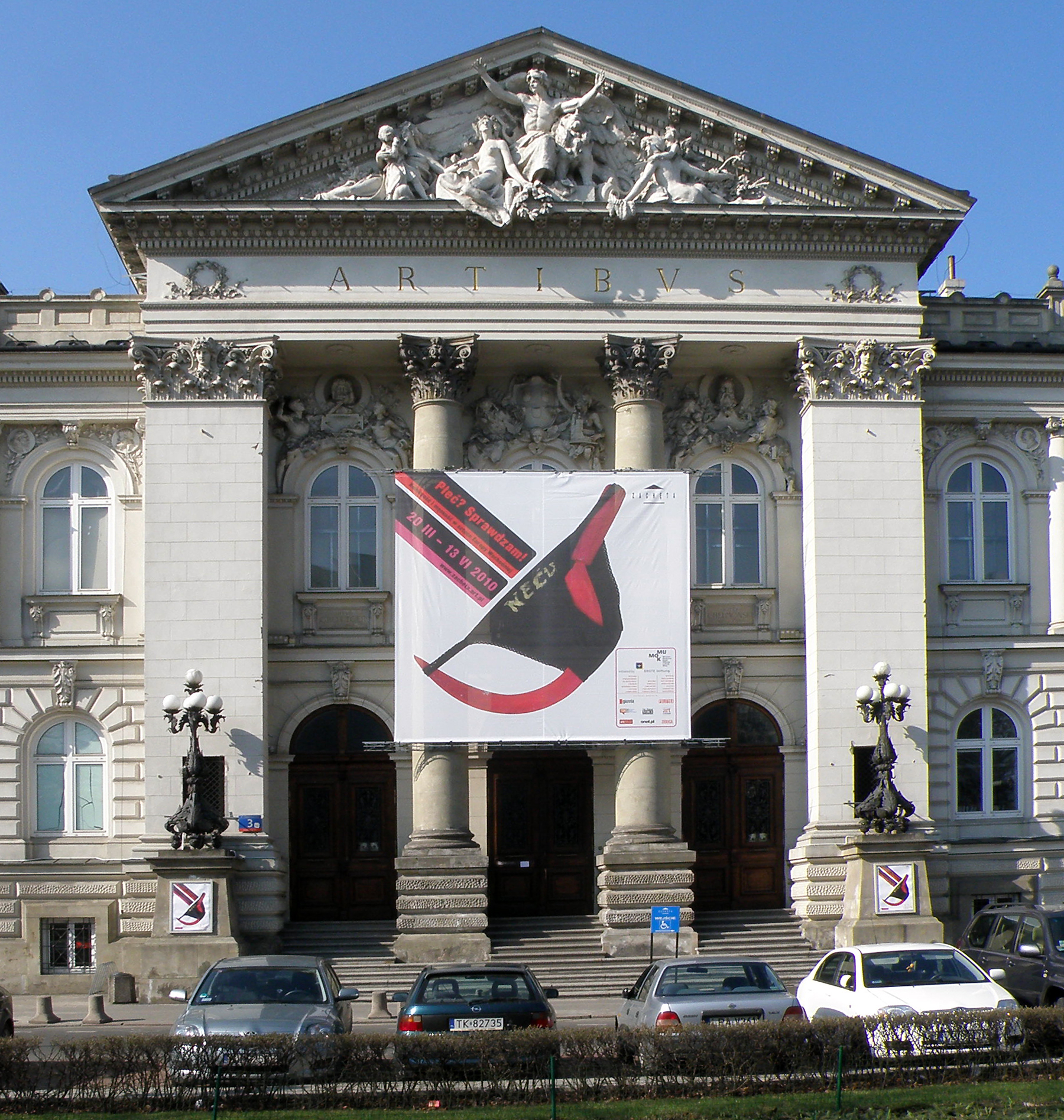 Zachęta Narodowa Galeria Sztuki (na budynku baner reklamujący wystawę "Płeć? Sprawdzam!")